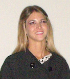 Retrato de actriz peruana, Anahí de Cardenas